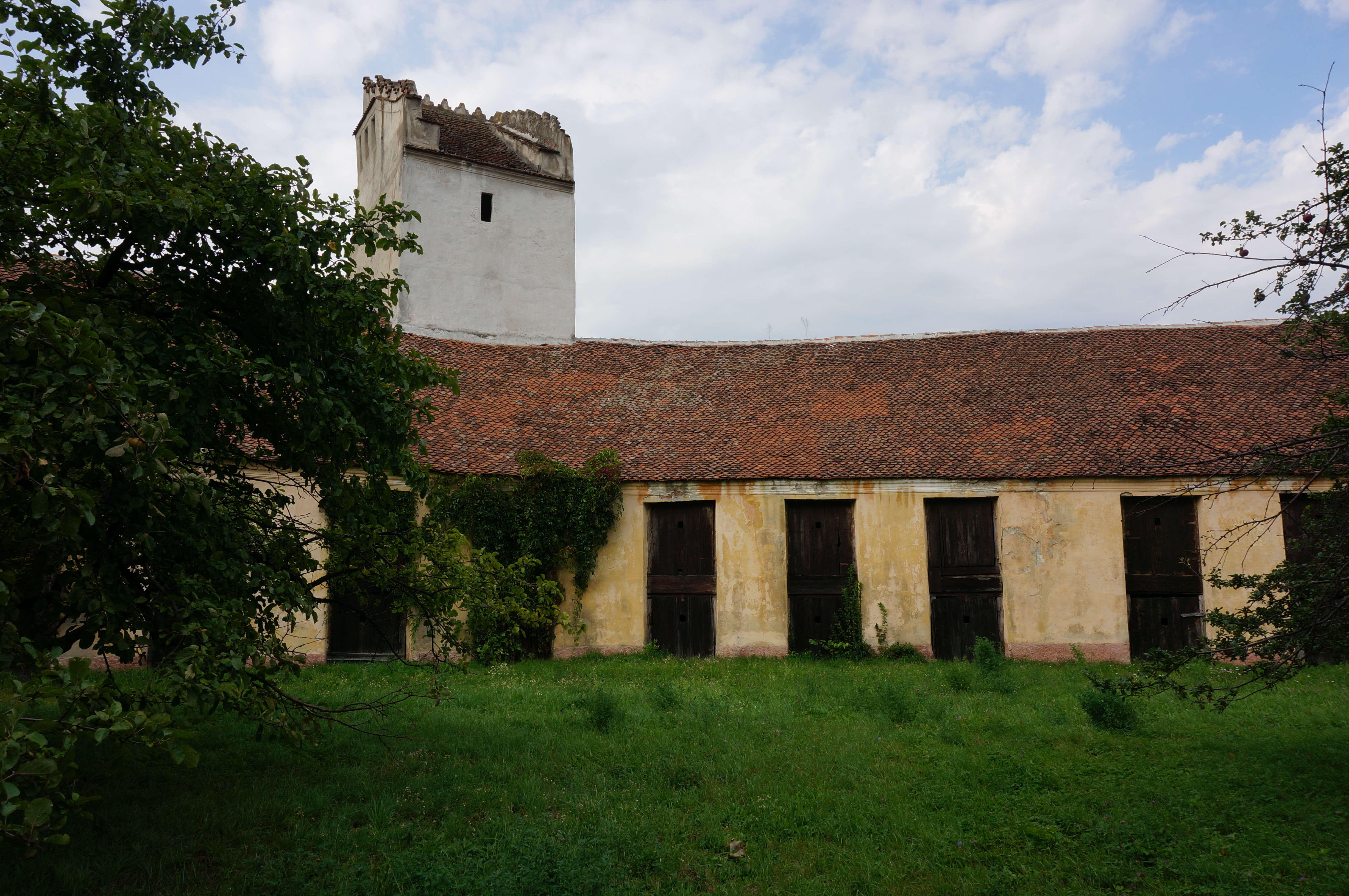 Fortificația medievală 02